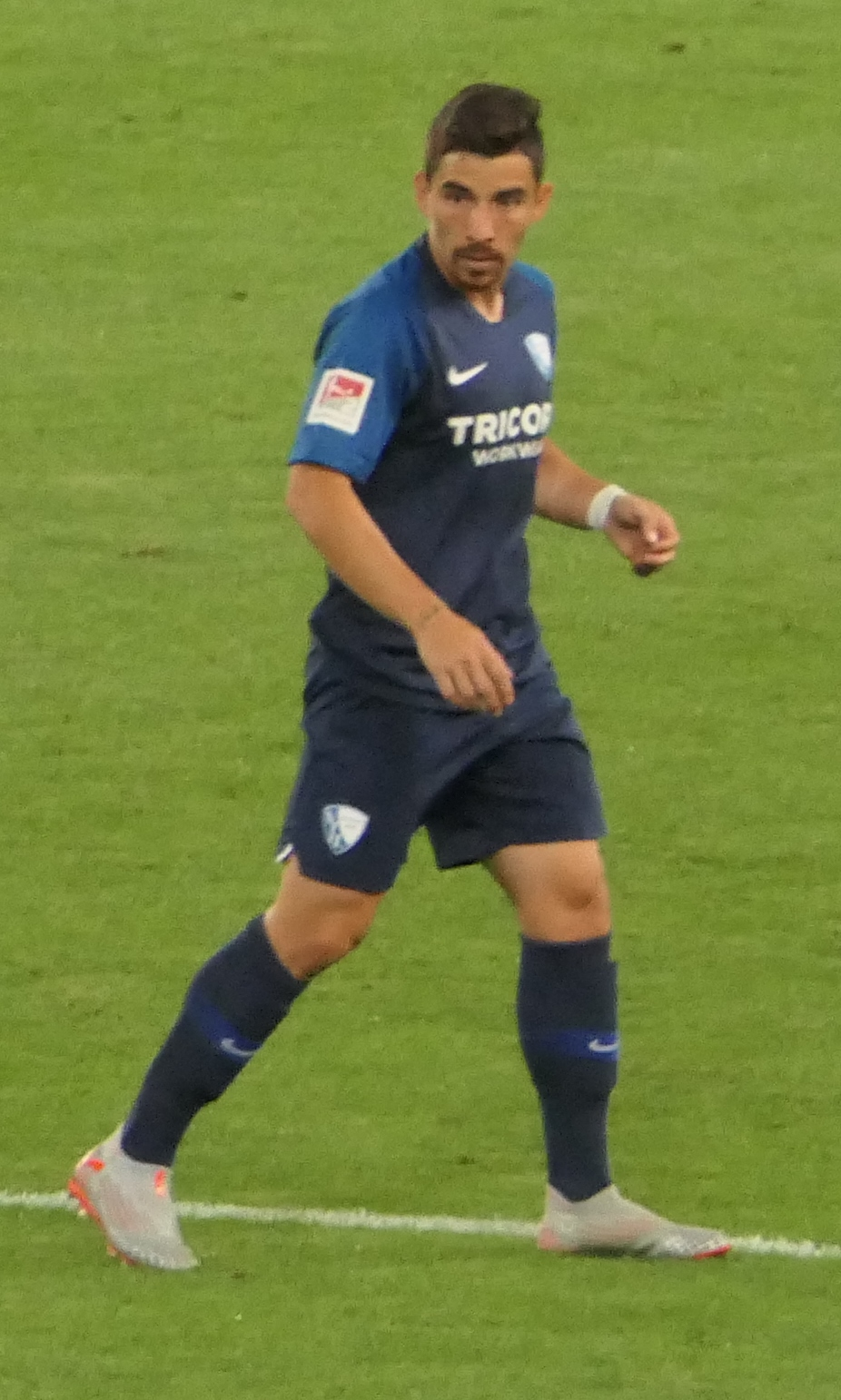 Der Fussballprofi Danilo Soares im Trikot vom VfL Bochum beim Auswärtsspiel gegen den VfB Stuttgart am 02.09.2019.